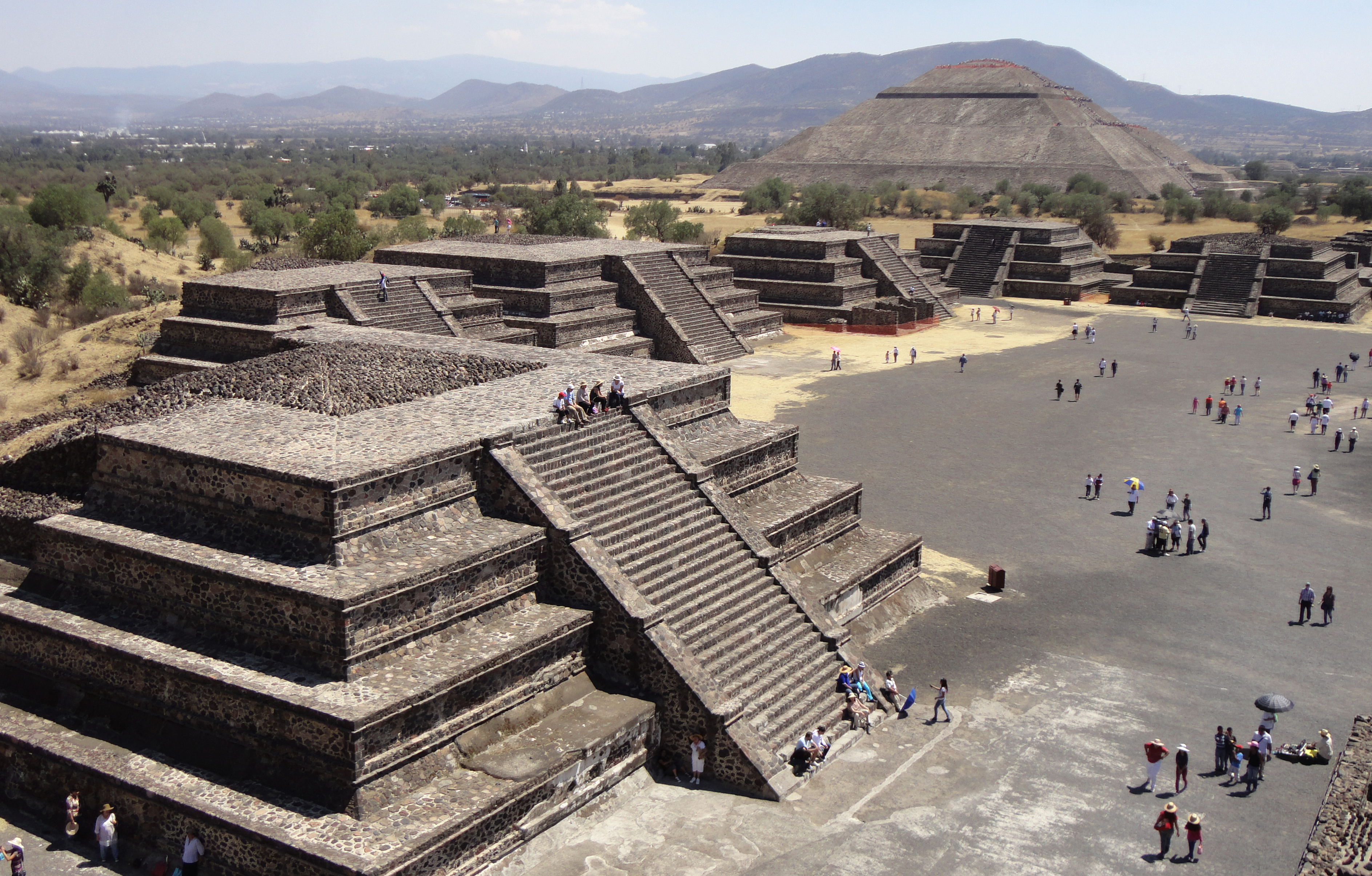 Vista desde la Pirámide de la Luna - Teotihuacan, Estado de México, México. Cruz Teotihuacana.